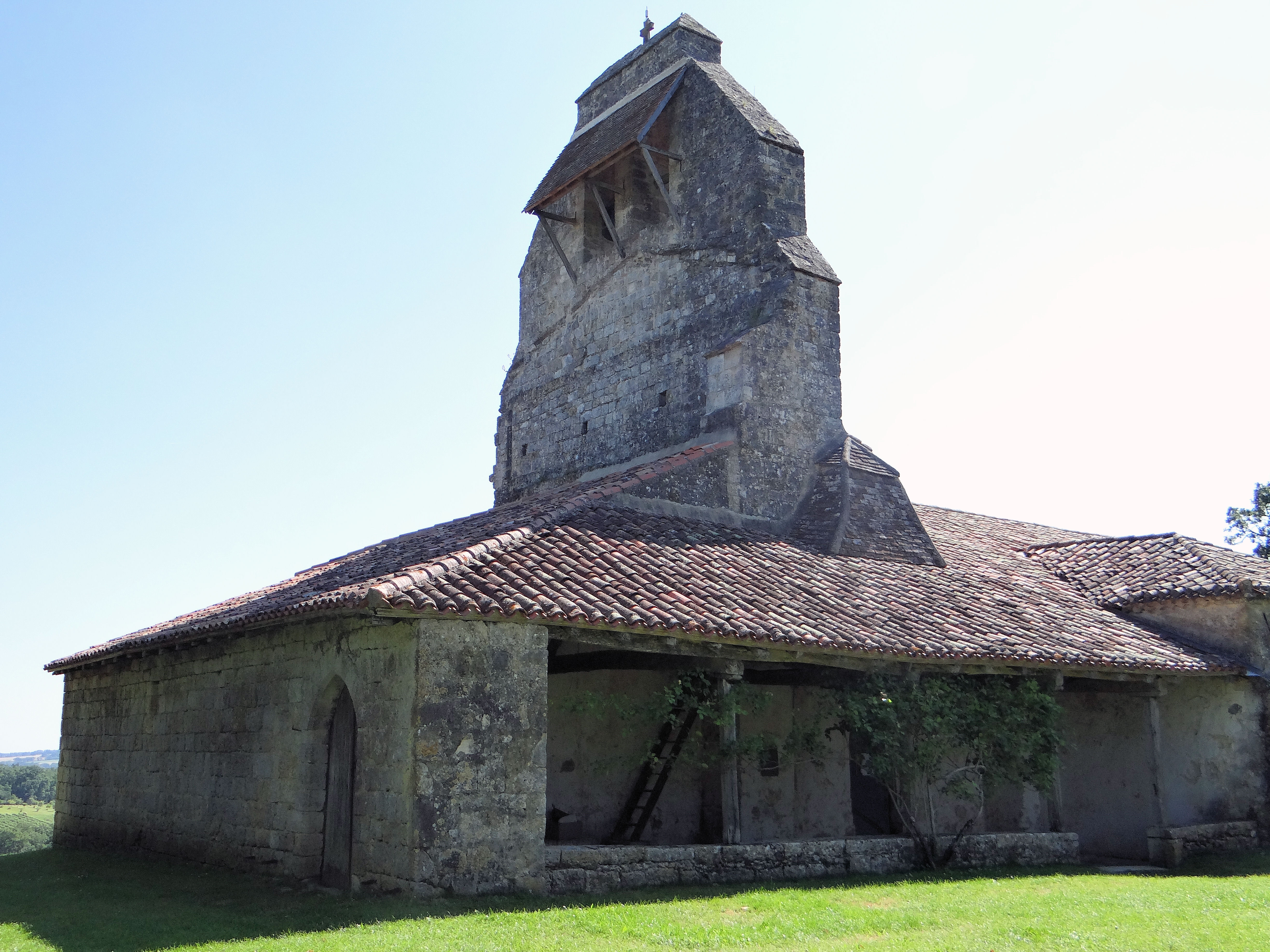 Larroque-sur-l'Osse - Église Saint-Martin d'Heux